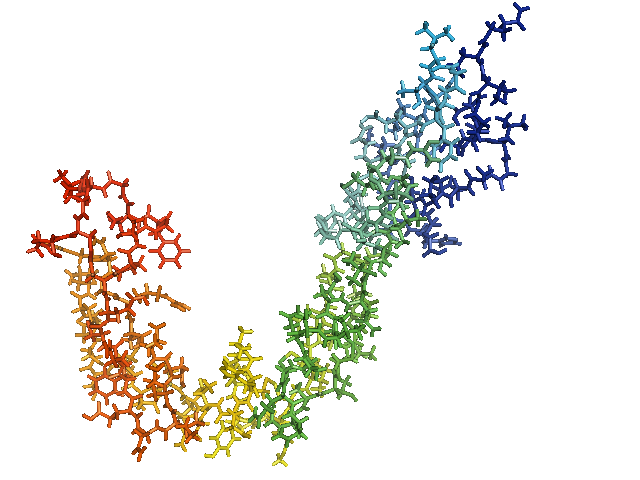 Human NOTCH-1 (ligand binding region)